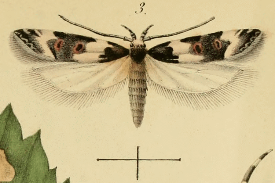 Teleiopsis rosalbella (Fologne, 1862)